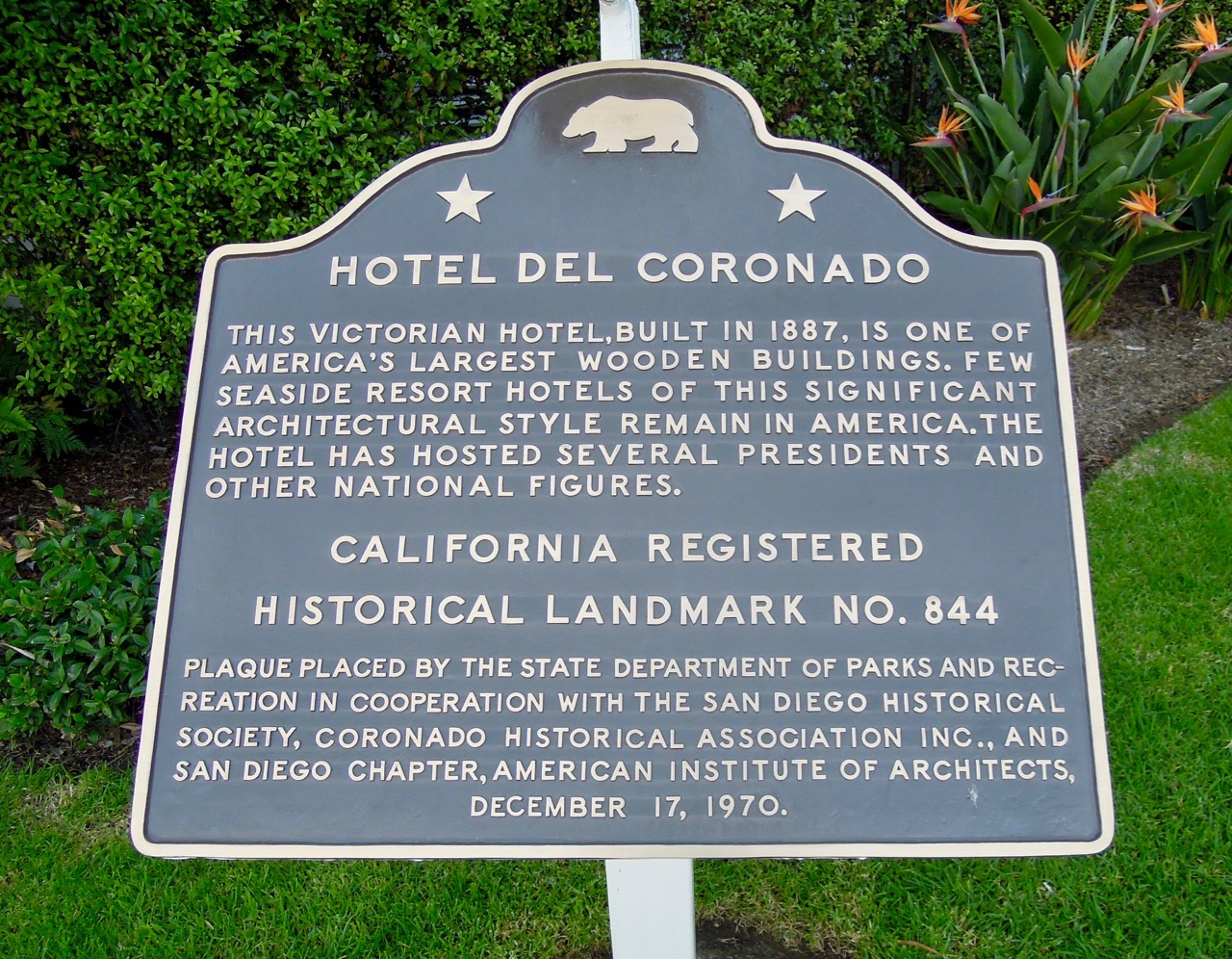 Das Hotel del Coronado in San Diego wird als Historical Landmark geführt.